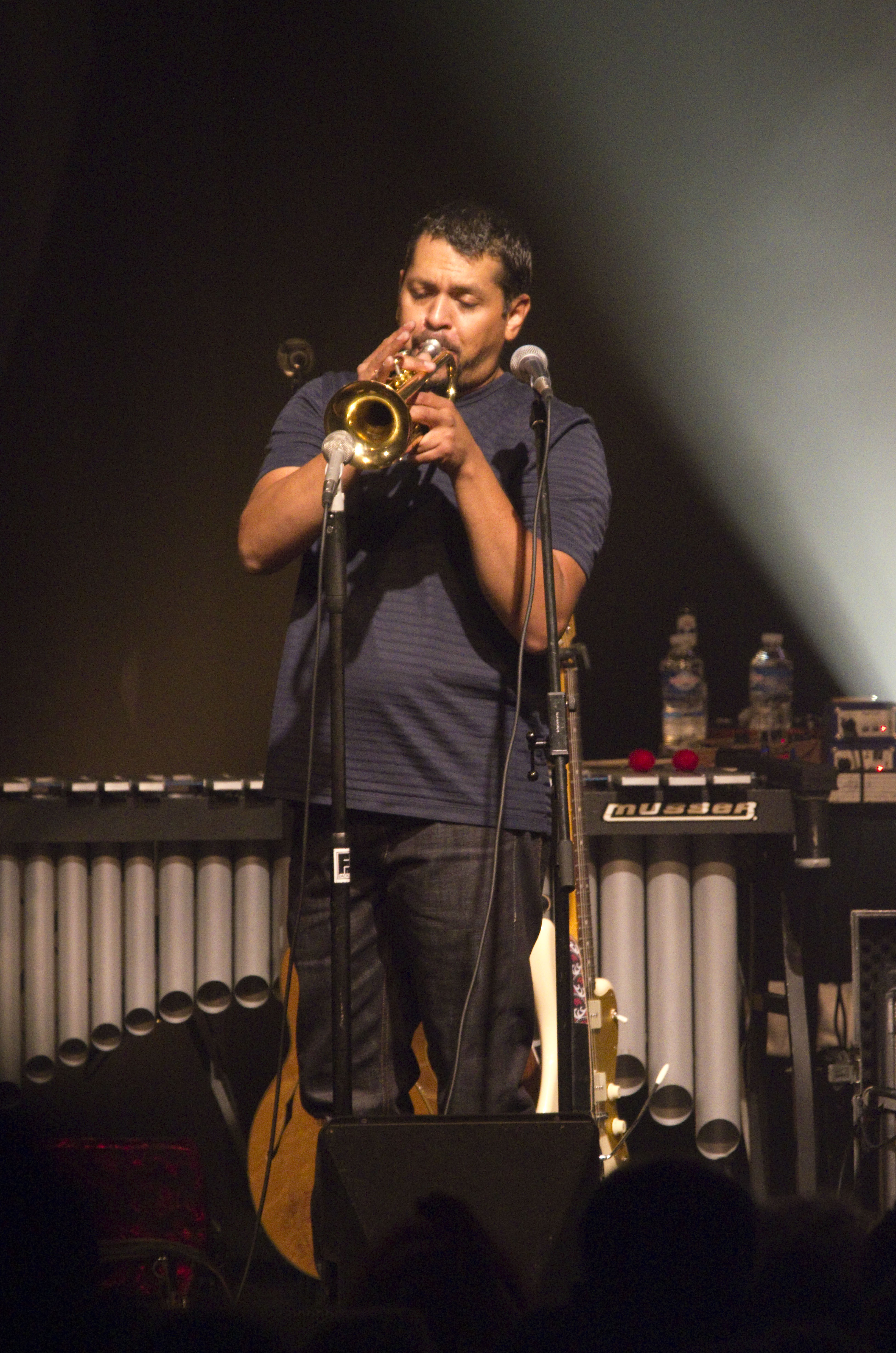 Das Zelt-Musik-Festival 2016 in Freiburg im Breisgau 13.07.2016 Calexico